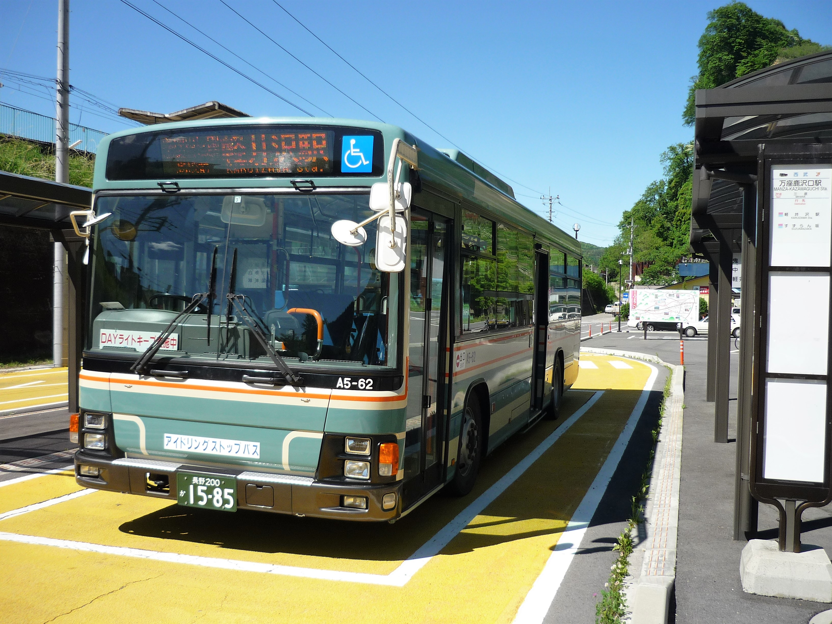 万座・鹿沢口駅バスターミナルに停車中の西武観光バス（旧・西武高原バス）軽井沢駅行き